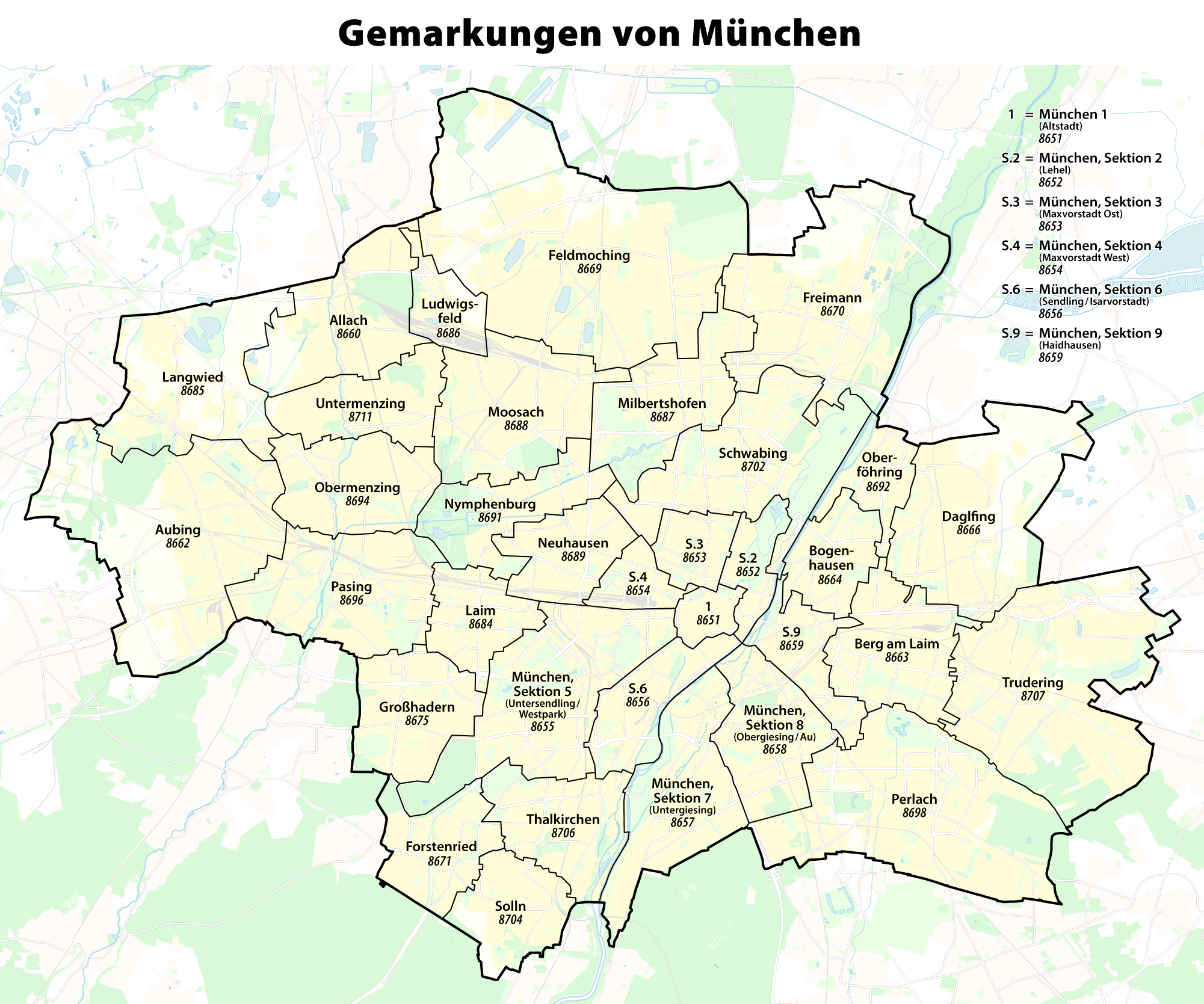 Karte der Gemarkungen in MünchenHinweis: Die dargestellten Grenzlinien können nur einen ungefähren Eindruck von deren tatsächlicher räumlichen Lage vermitteln. Für genauere Informationen deshalb bitte unbedingt die entsprechenden amtlichen Nachschlagewerke zu Rate ziehen!